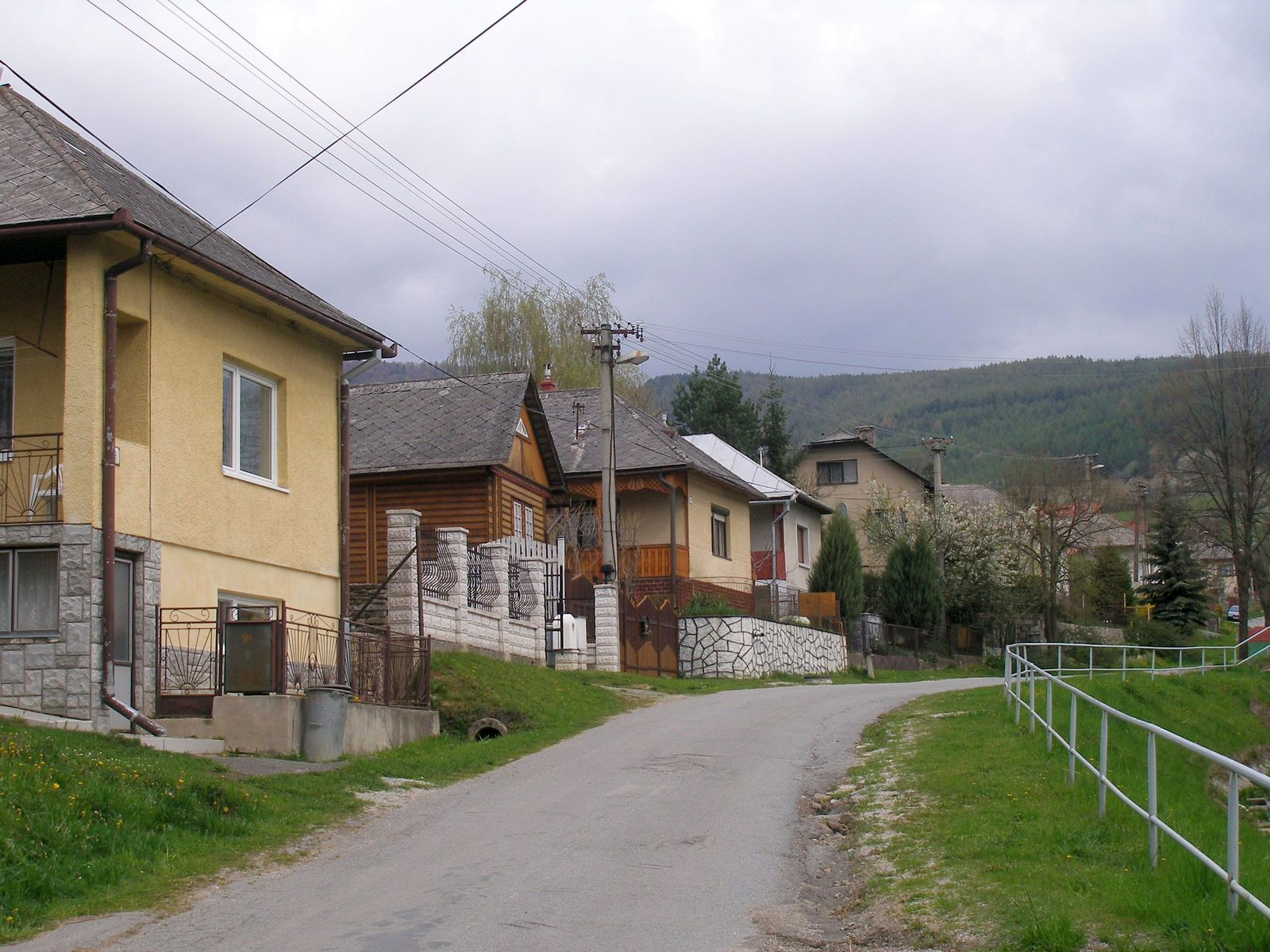 Obec Lipovce okres Prešov región Šariš